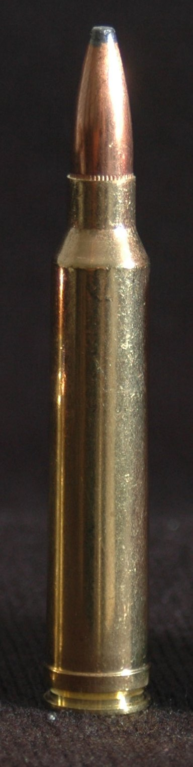 long range rifle ammunition calibre en:.300 Winchester Magnum